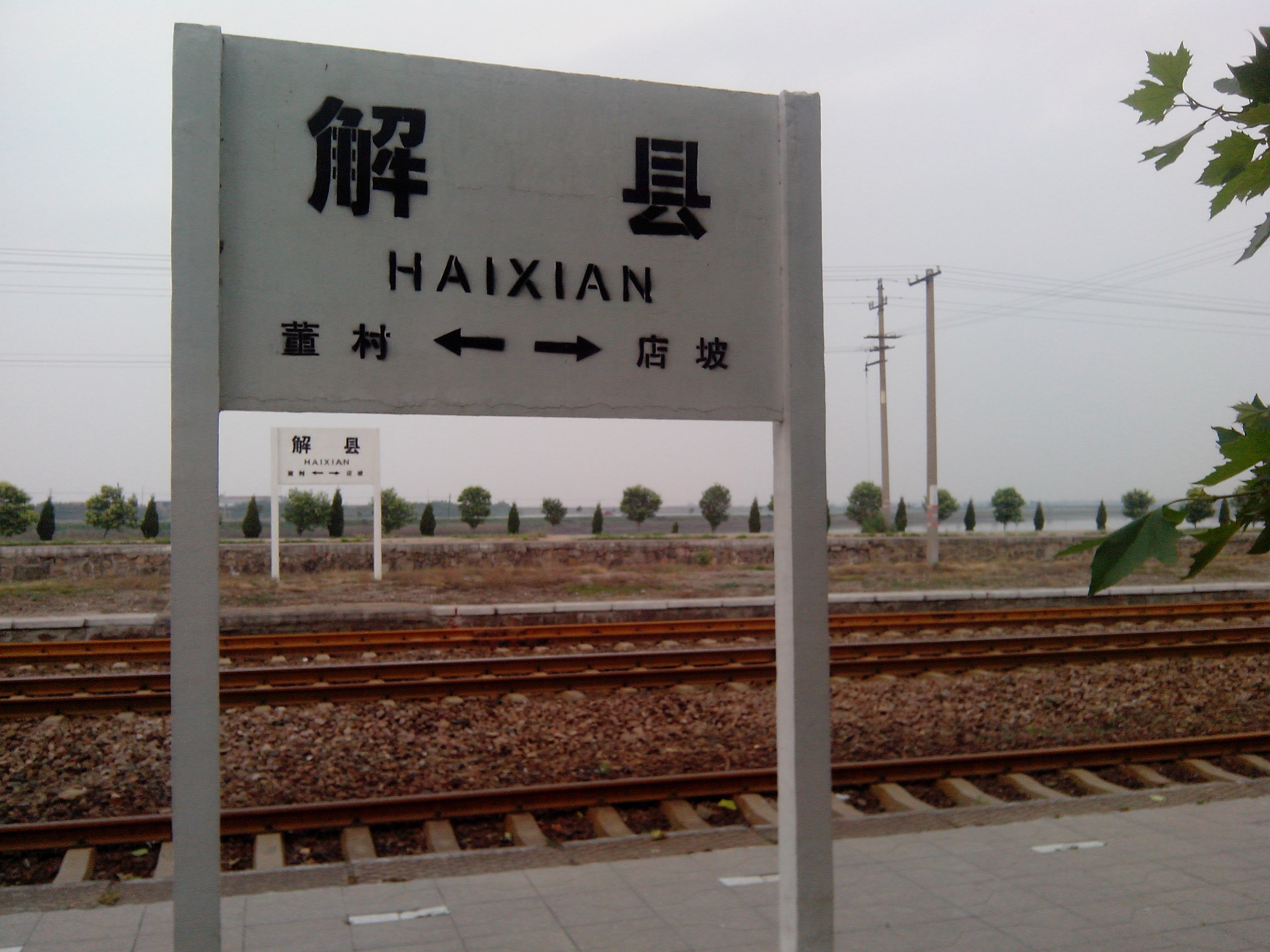 解县火车站